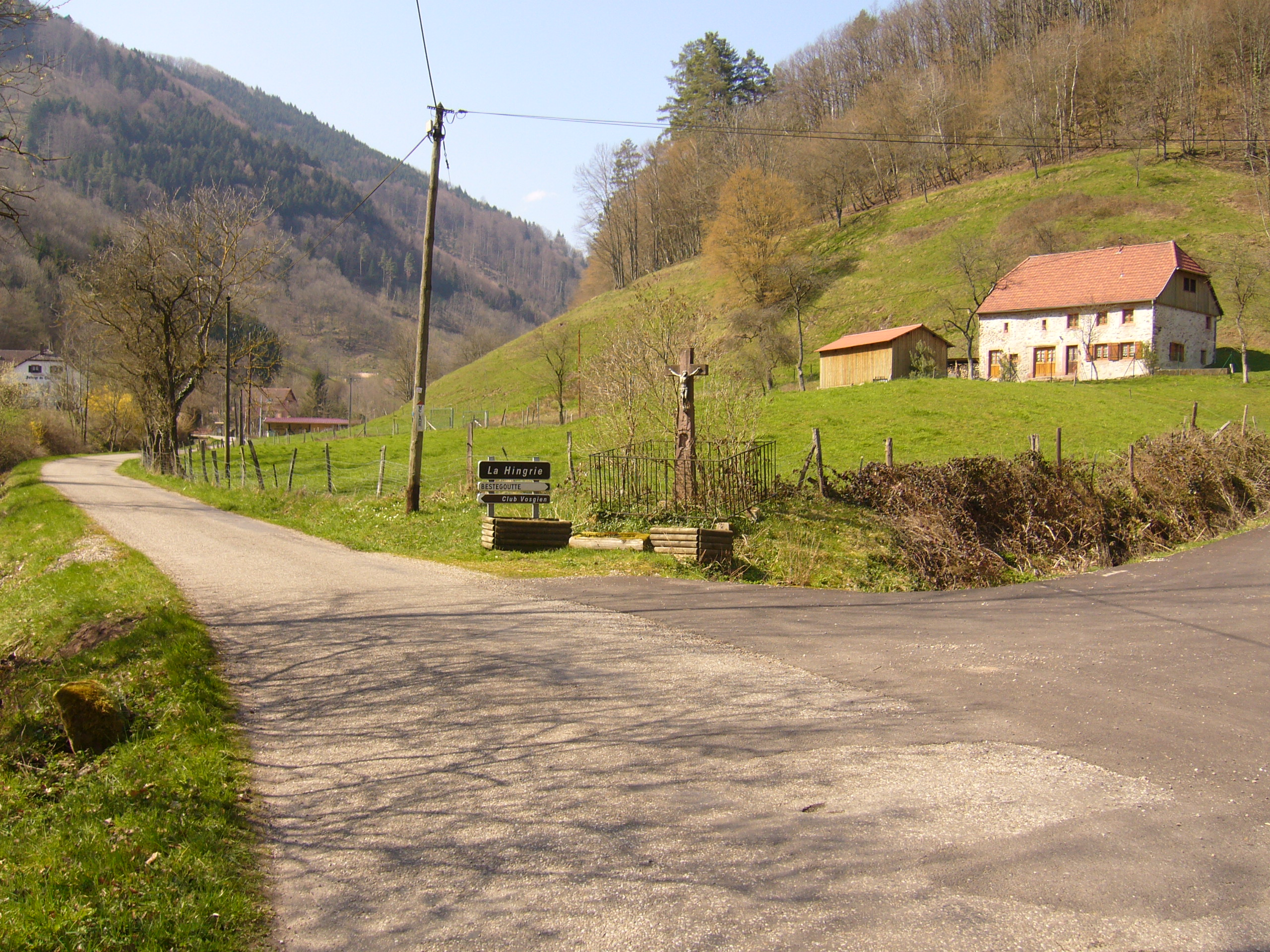 La Hingrie 034.JPG